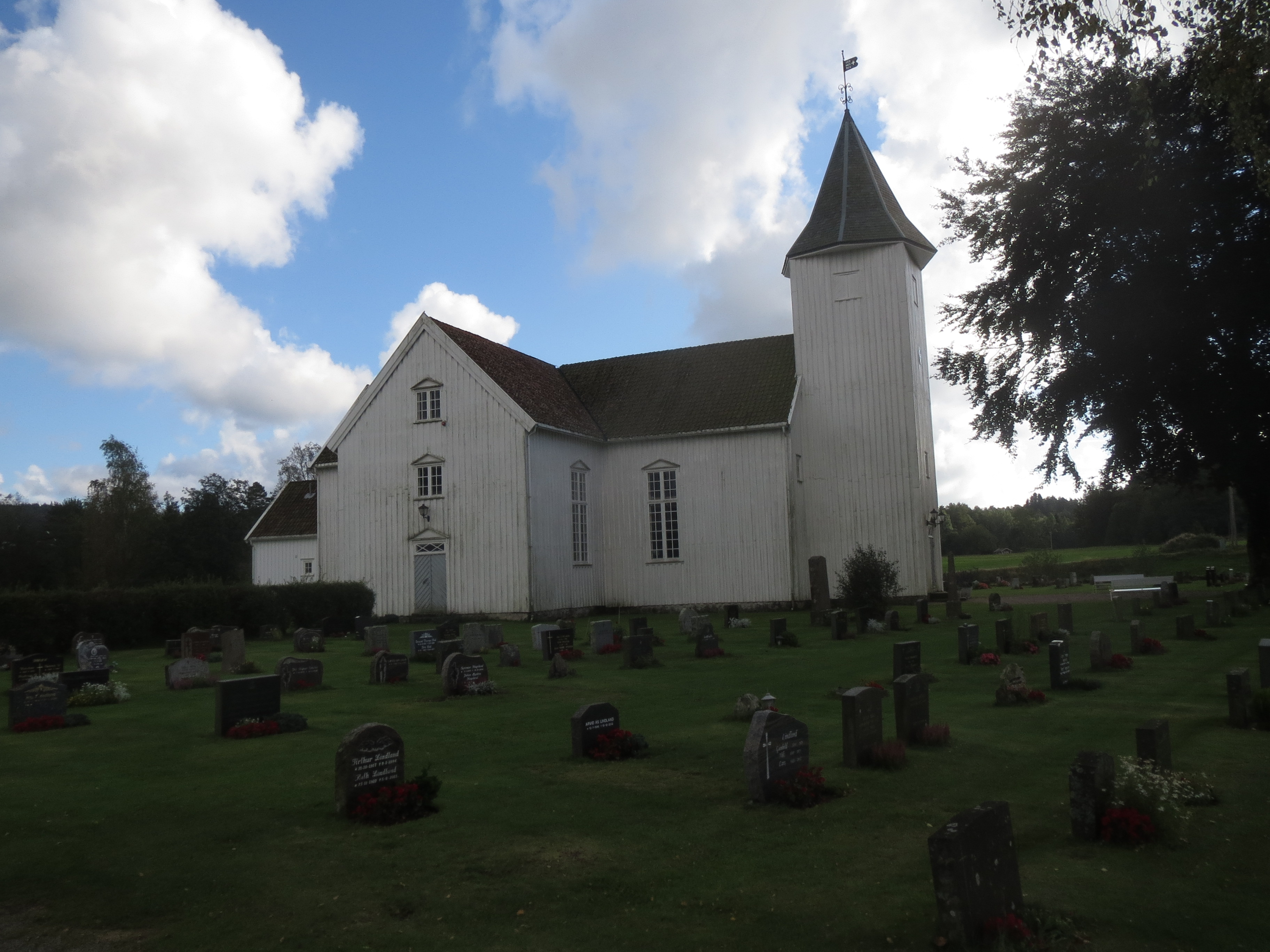 Holum kirke, Mandal kommune